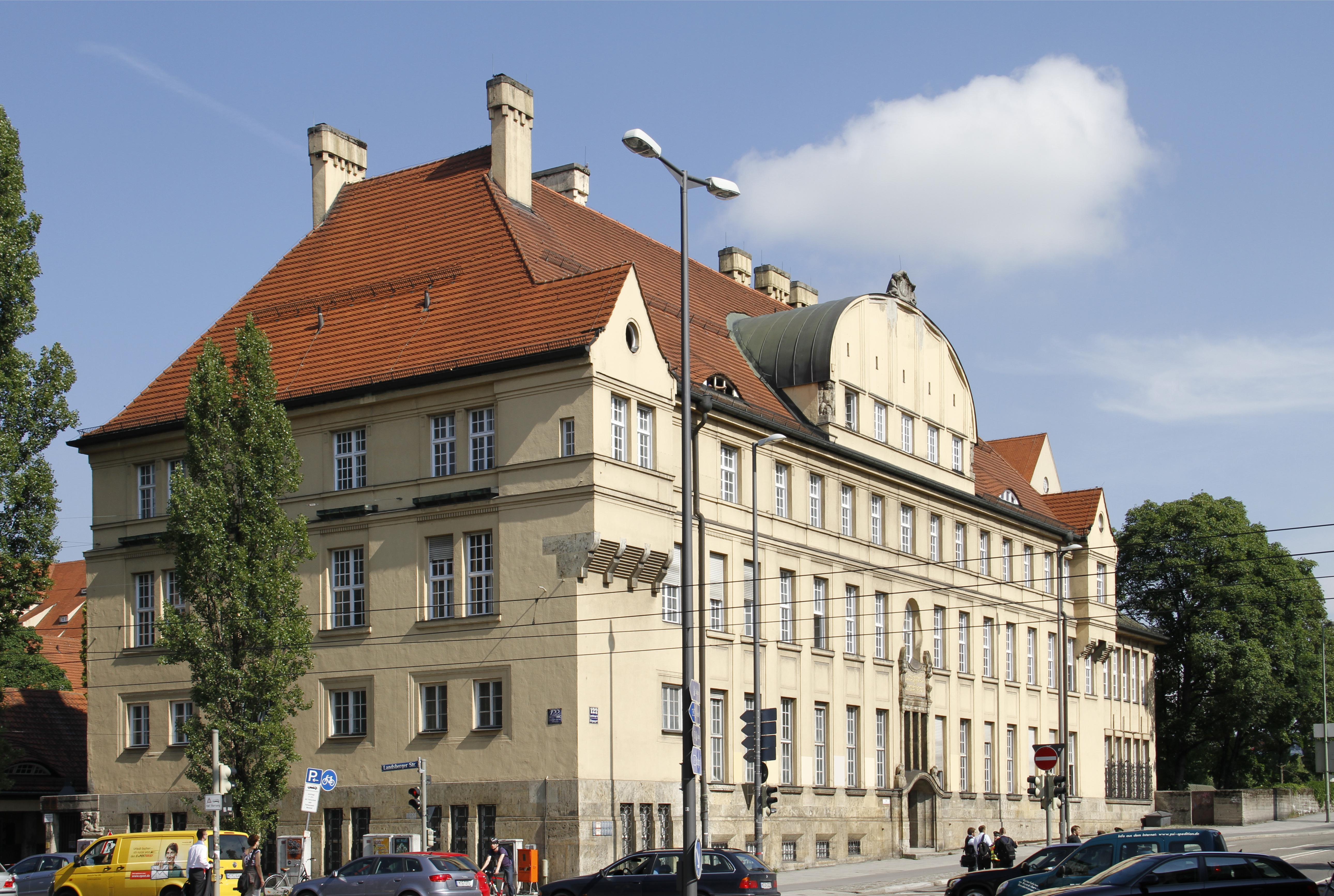 Technische Prüf- und Lehranstalt als Teil des Gebäudekomplex Hauptzollamt München. Ansicht von Südost.